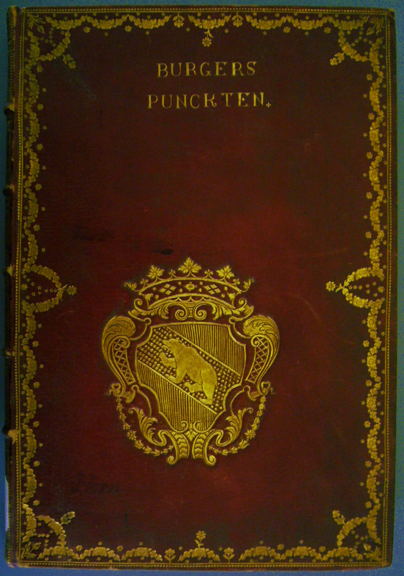 Burgerspunkten